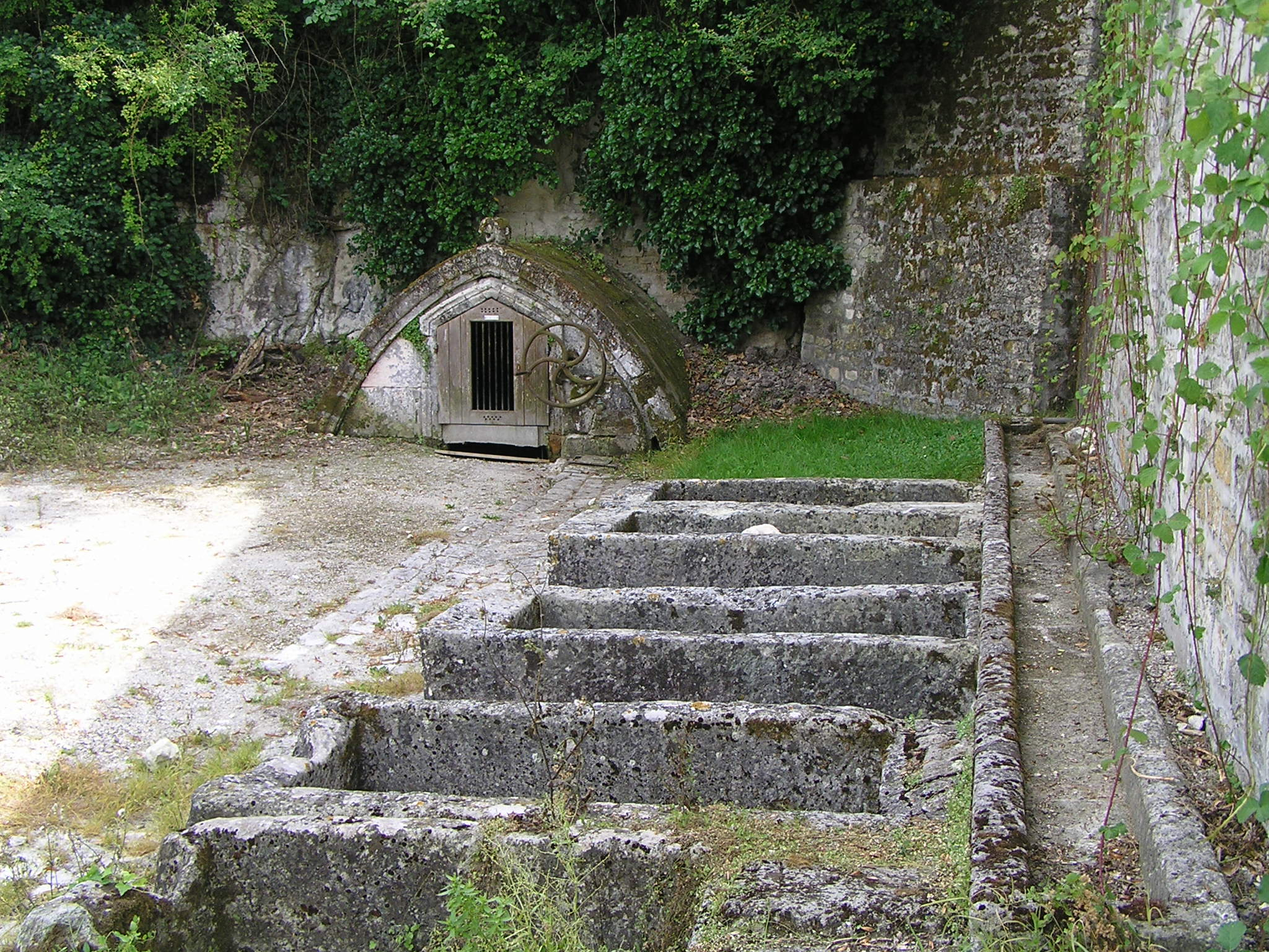 puits et abreuvoirs à Genté